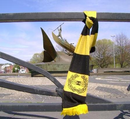 Hvalfangernes klubb